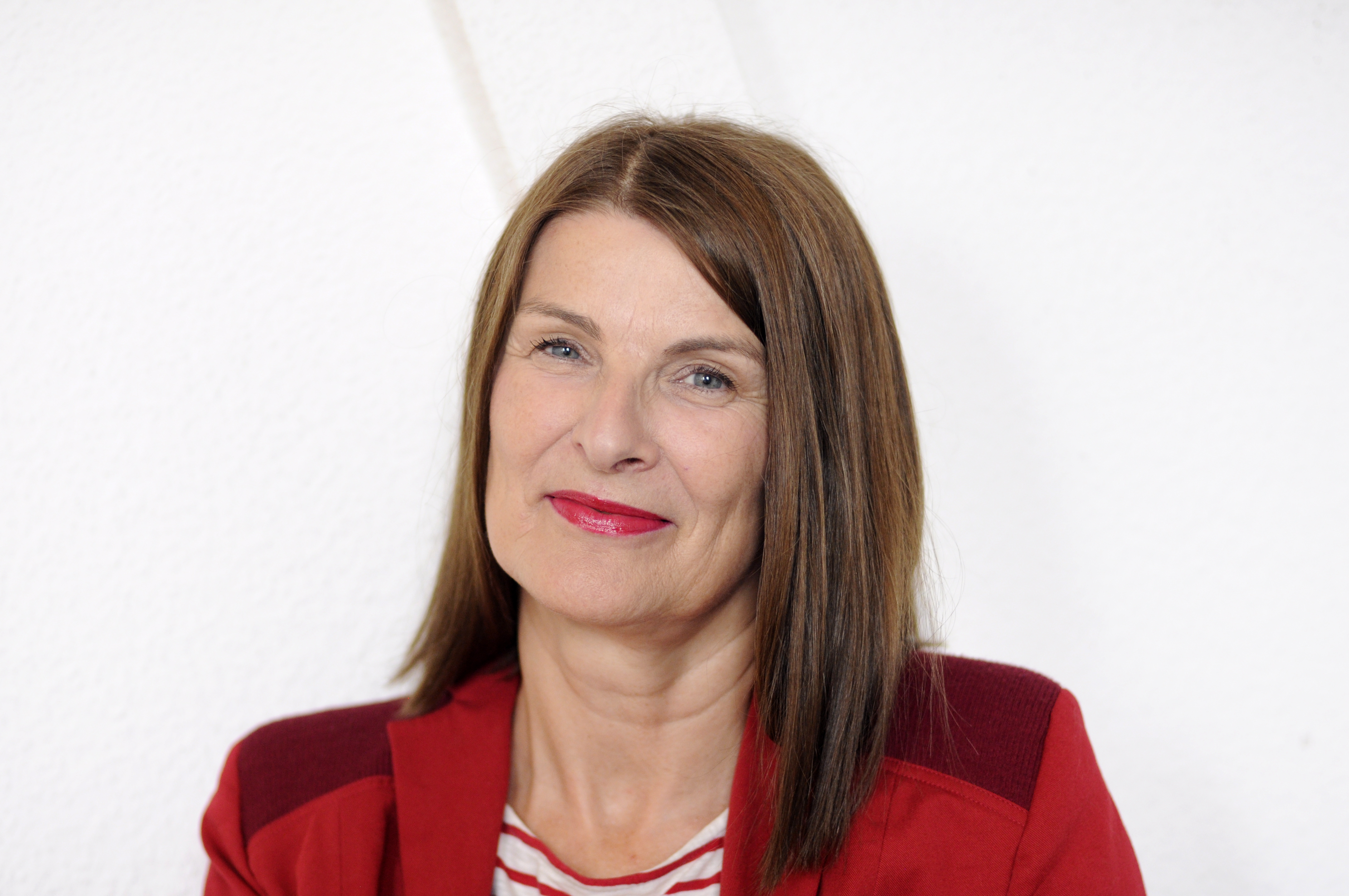 Sabine Scholl (2014)